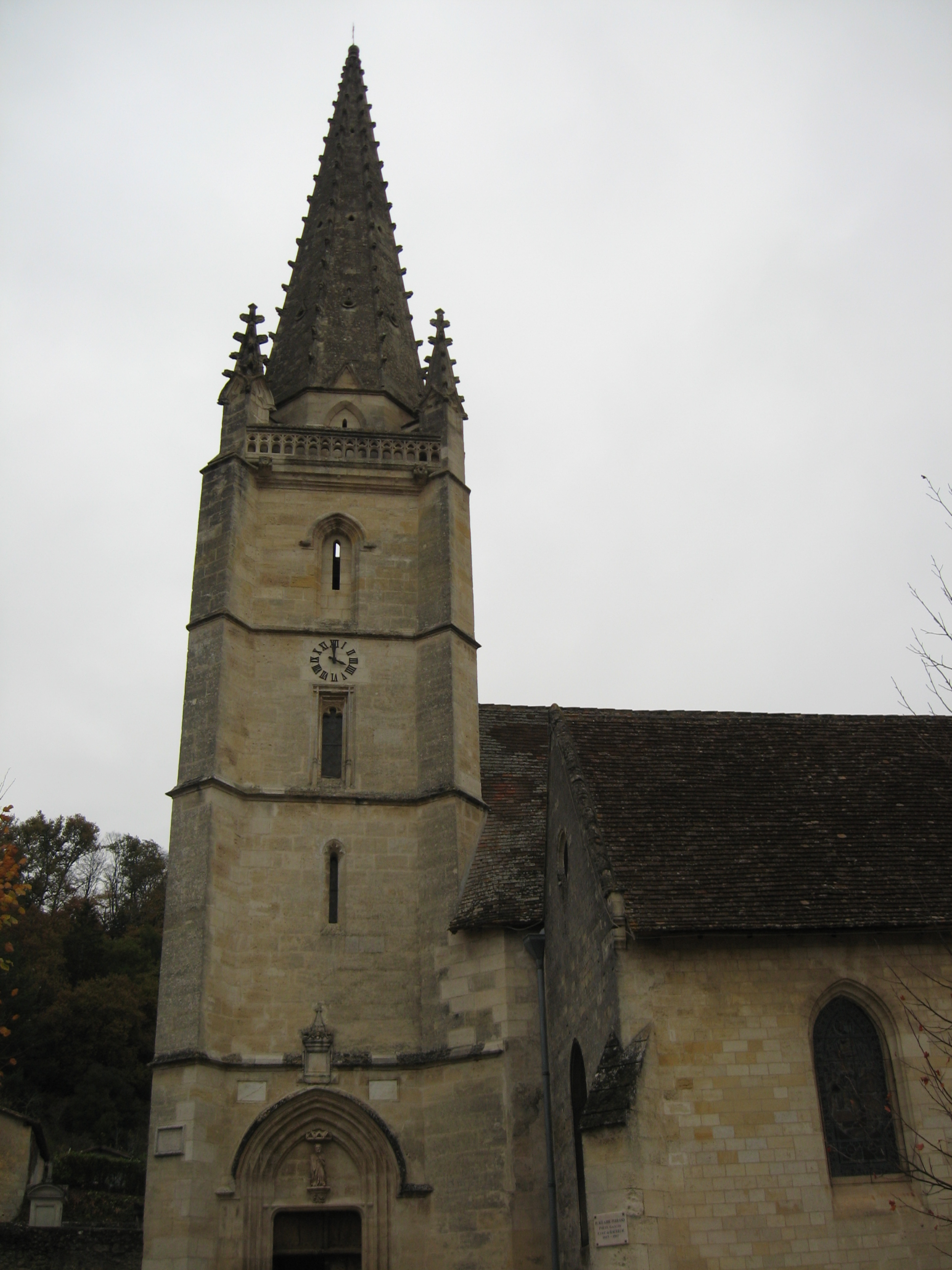 Clocher de l'église Saint-Saturnin de Baurech (gironde).